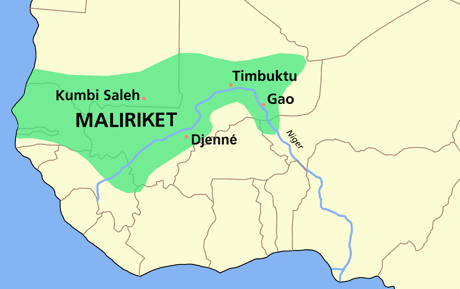 Malirikets utbredelse (ca 1350)